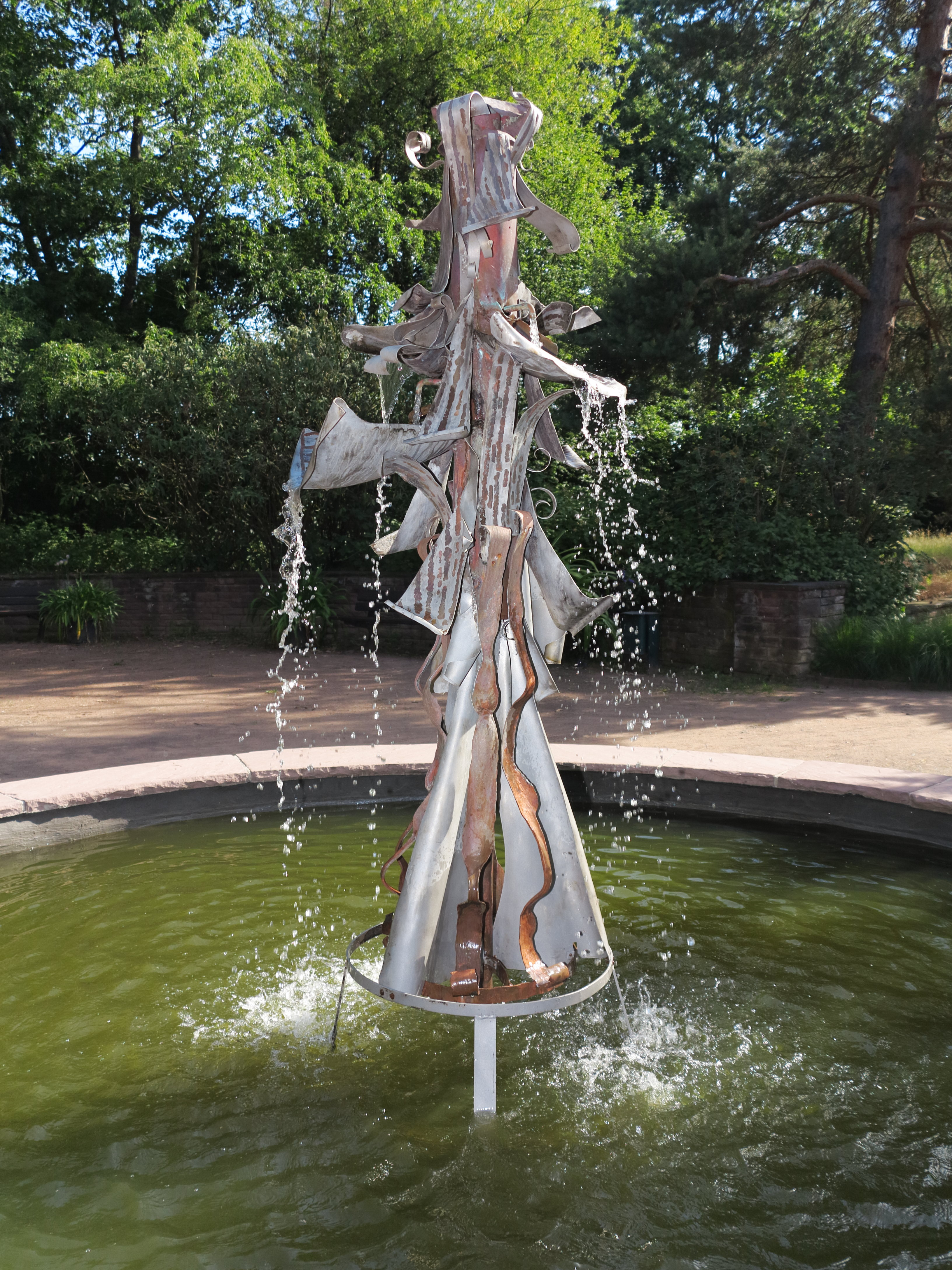 Der Märchenbrunnen, der wahrscheinlich häßlichste Brunnen Braunschweigs, im Schul- und Bürgergarten. Er wurde Ende der 1950er Jahre von dem Grafiker Erich Constein aus Metallabfällen gefertigt. Kurz vor dem Aufnahmezeitpunkt wurde er saniert.